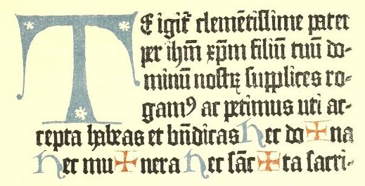 Misssale speciale (Constantiense), Beginn des Canon Missae